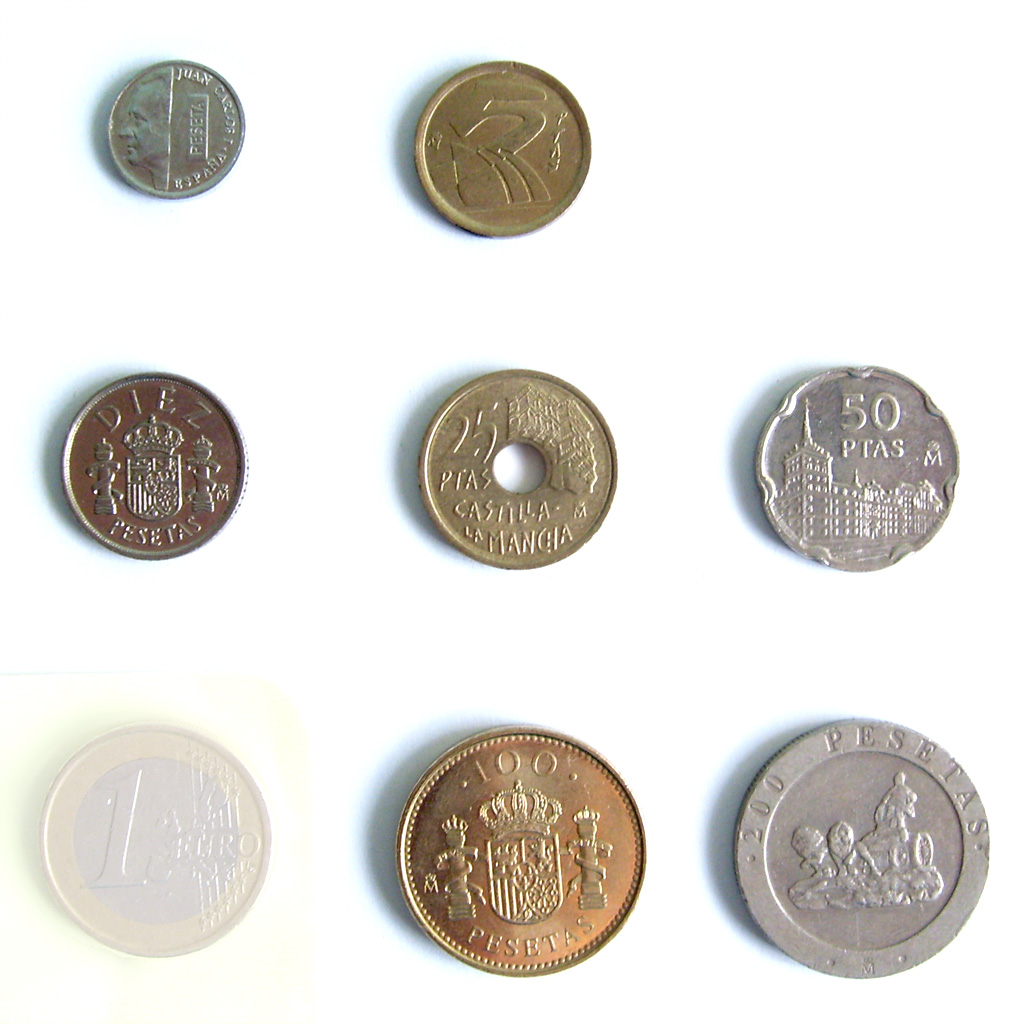 Monedas de pesetas habituales durante su última etapa. La columna central 5, 25 y 100 pesetas (1, 5 y 20 duros) eran entonces las más usadas. Solo falta la de 500 pesetas que era muy rara, así como las ediciones especiales conmemorativas.